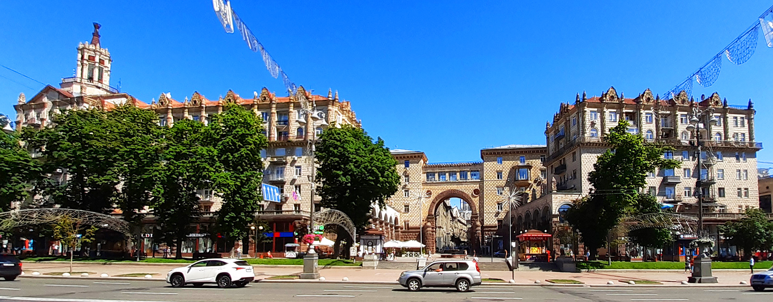 Панорама, Київ, Хрещатик вул., 17